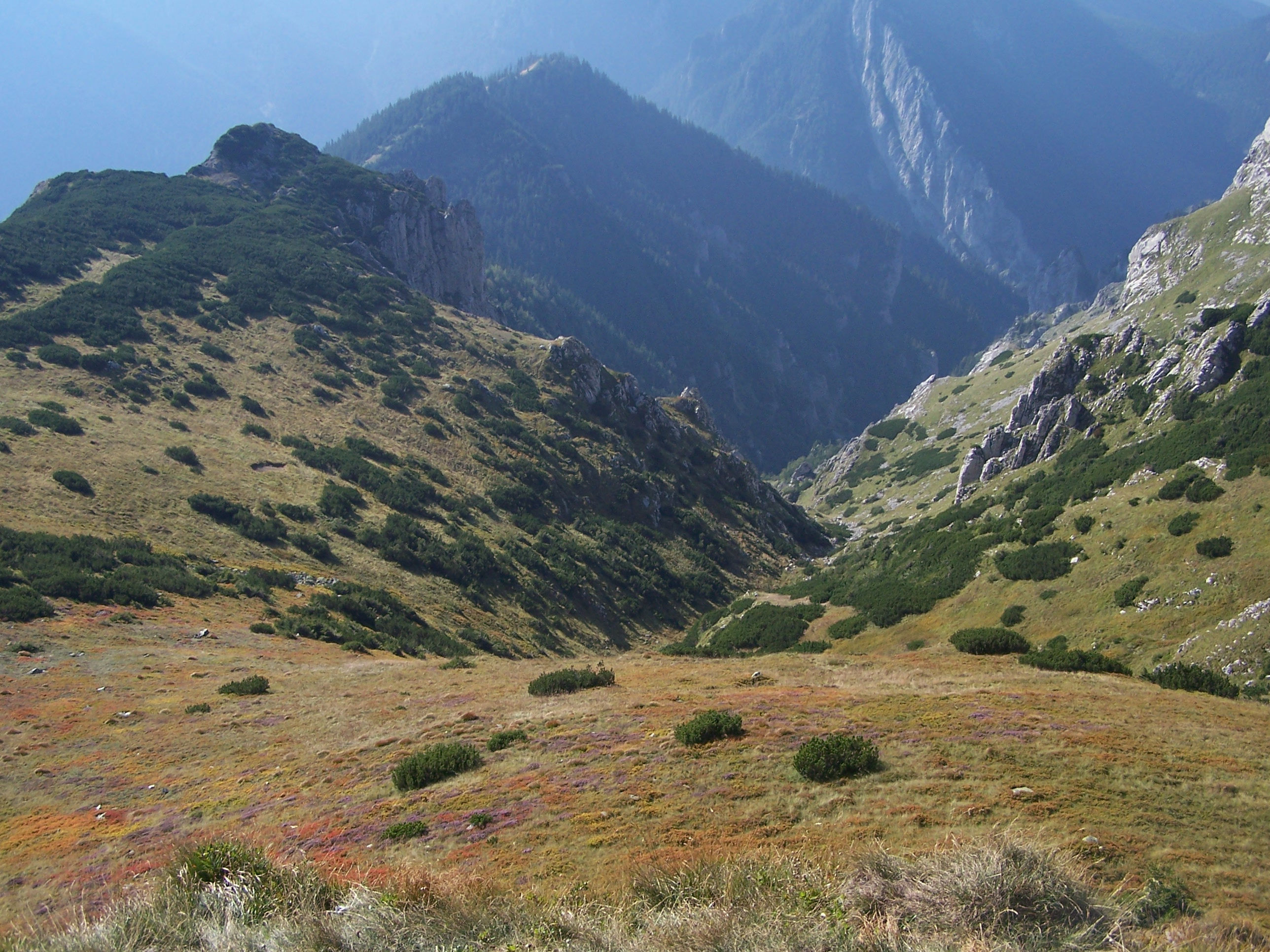 Tomanowy Grzbiet, Smreczyński Żar (Tatra Mountains)